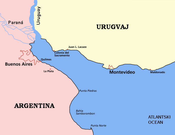 Zemljevid reke Río de la Plata - Srebrne reke. Lastnoročno sem prevedel izvirni zemljevid iz Zbirke.